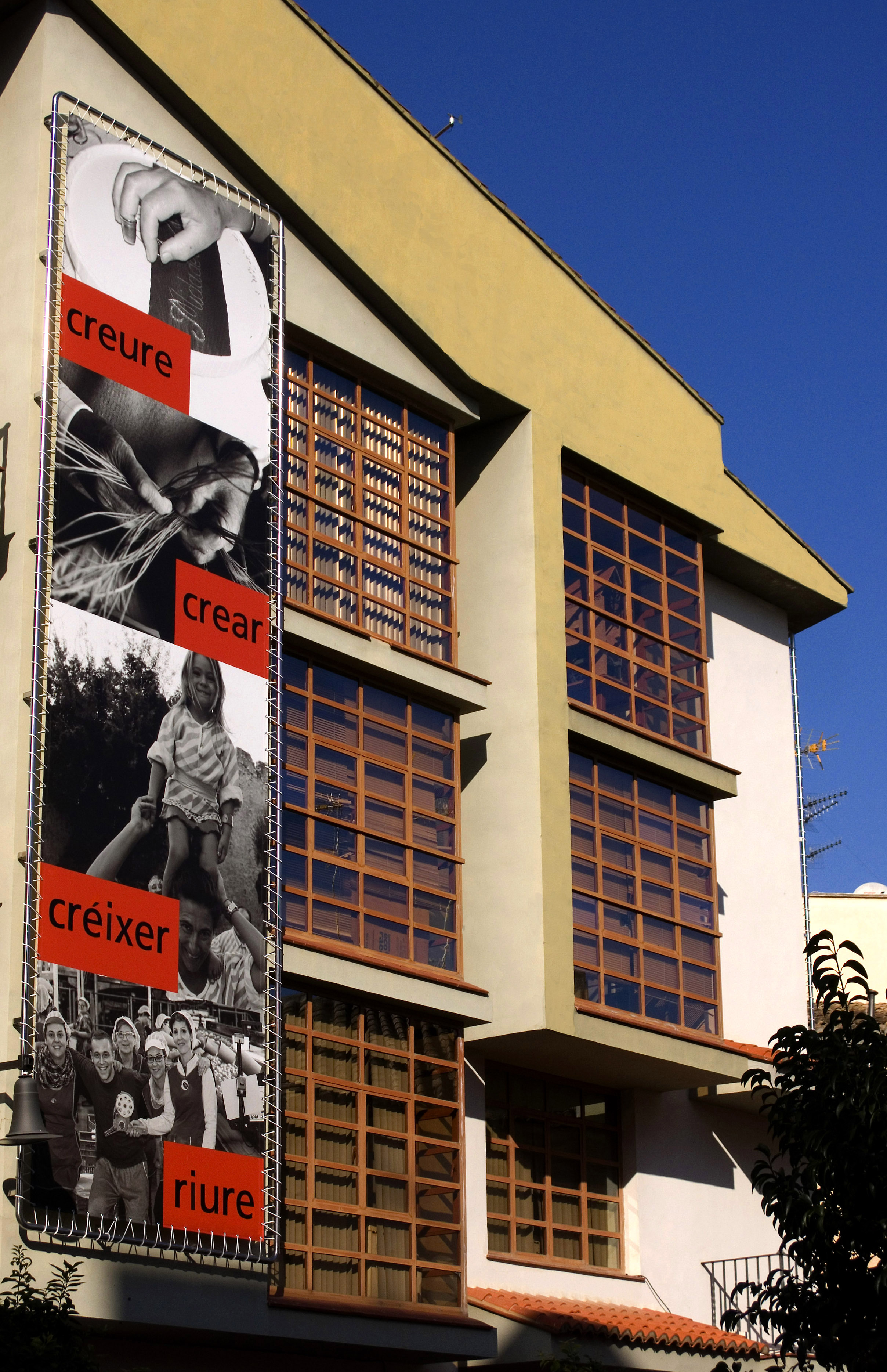 Ribera Alta (País Valencià)